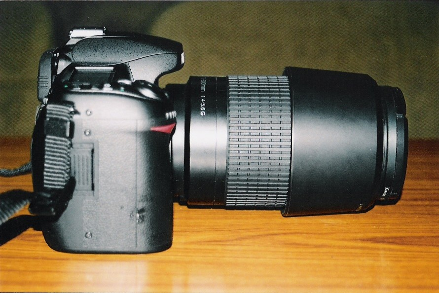 Nikon D80 with 70-300mm Nikkor lens